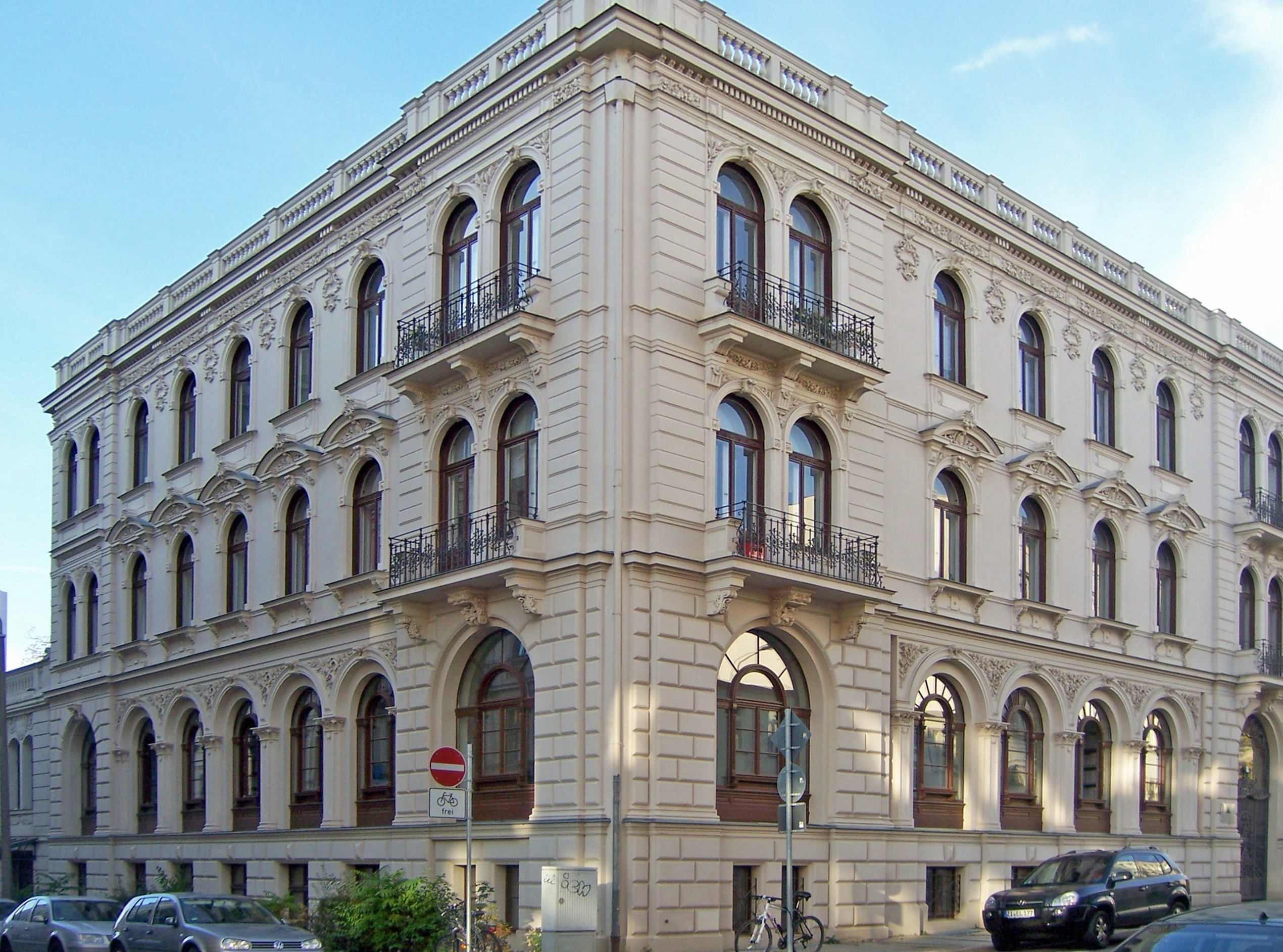 Gebäude des Musikverlages C. F. Peters. Wohn- und Geschäftshaus, erbaut 1874, Architekt: Otto Brückwald, Talstraße, Leipzig